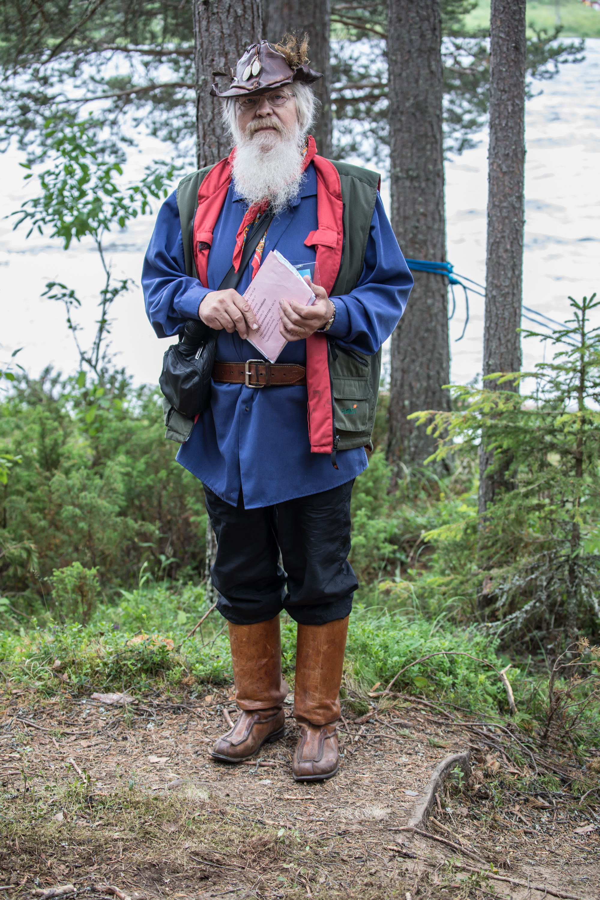 Tukkilaiskisojen ylituomari Esa Hellsten, Kattilakoski, Juoksenki